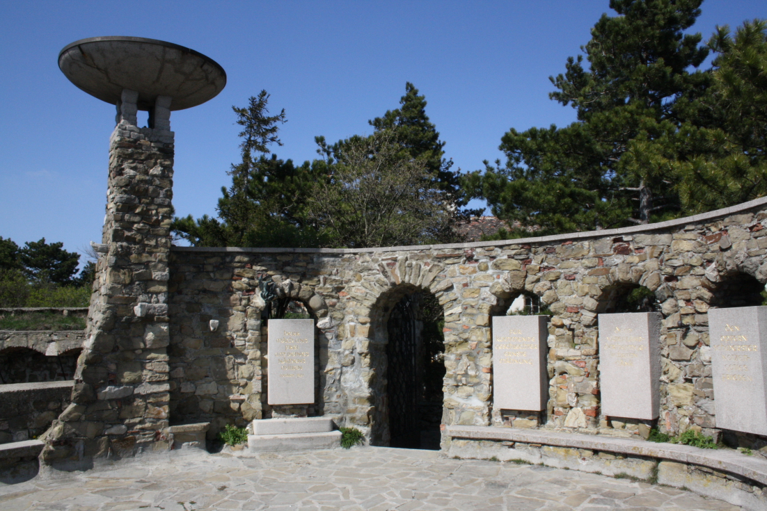 Heimkehrer-Gedächtnismal am Leopoldsberg im 19. Wiener Gemeindebezirk Döbling.